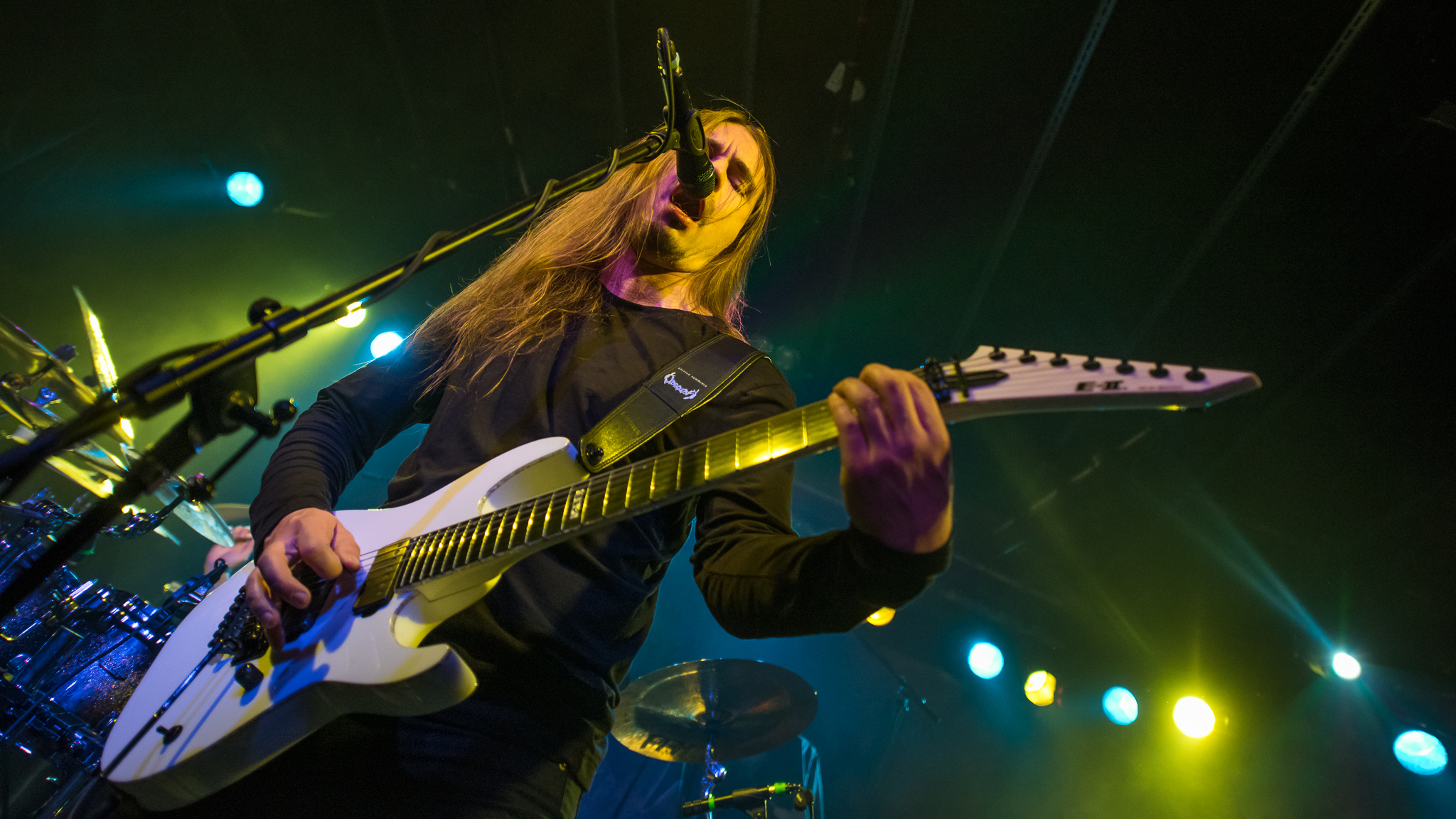 Concertbüro Franken,Der Hirsch,Konzert,Livekonzert,Livemusik,Obscura,Steffen Kummerer